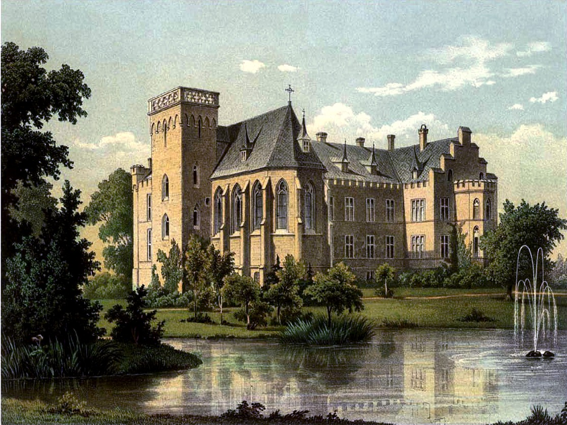 Haus Lohe, denkmalgeschütztes Gebäude in Werl-Westönnen, Kreis Soest